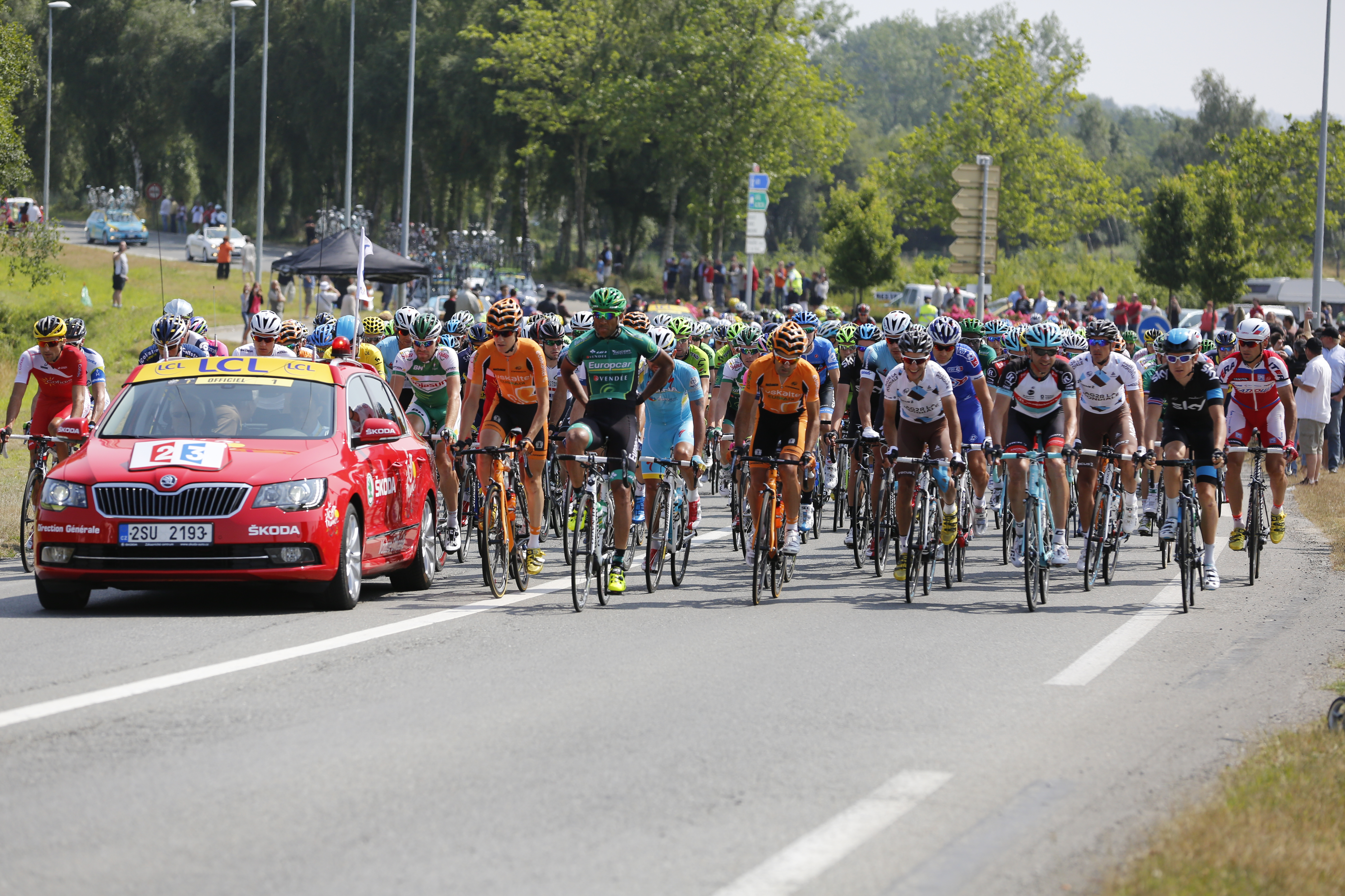 Le peloton au départ de la 12e étape du Tour de France 2013 sur la Route nationale 12 à Javené.